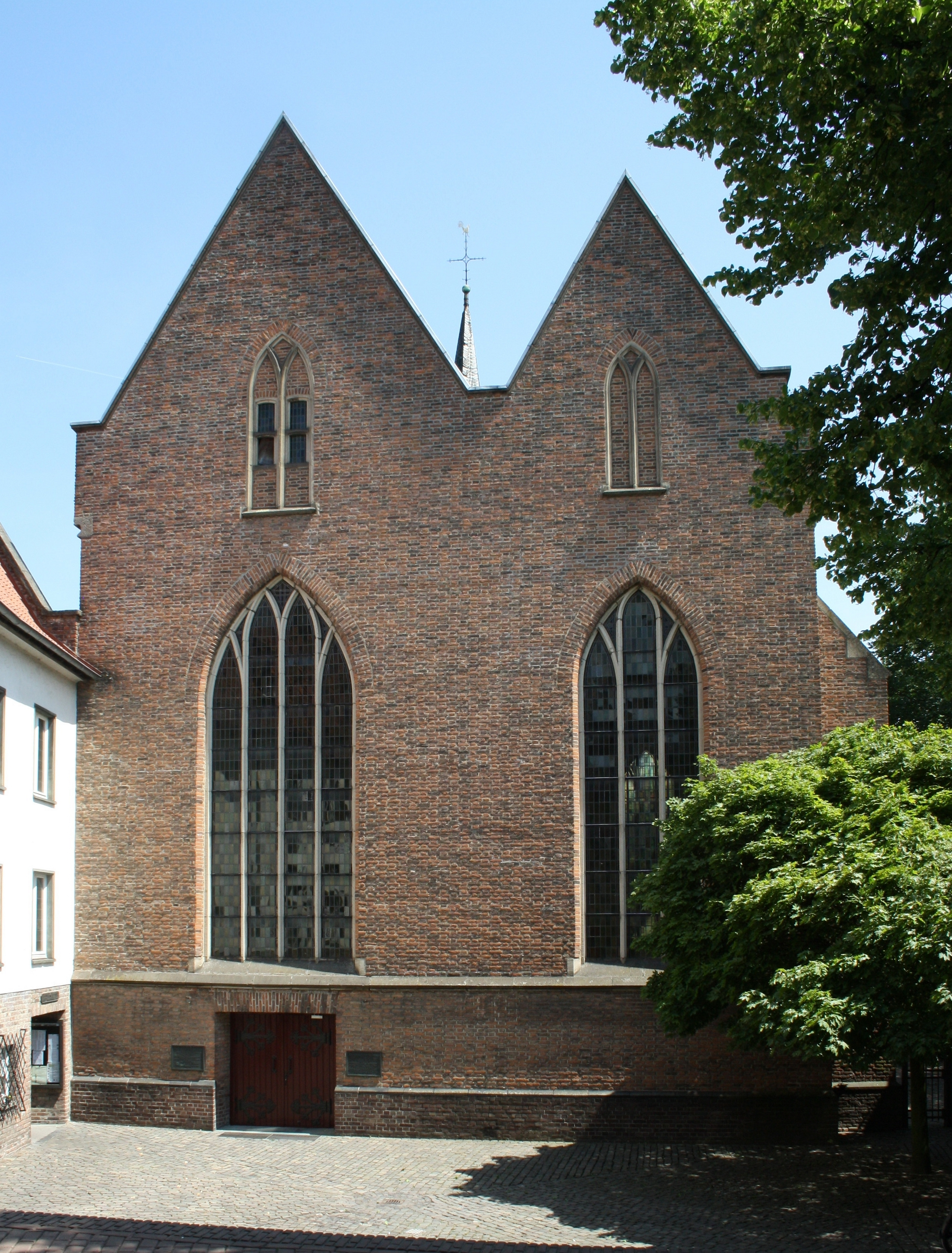 Kleve, kath. Kirche St. Mariä Empfängnis (Unterstadtkirche), früher Minoritenklosterkirche; Westfassade